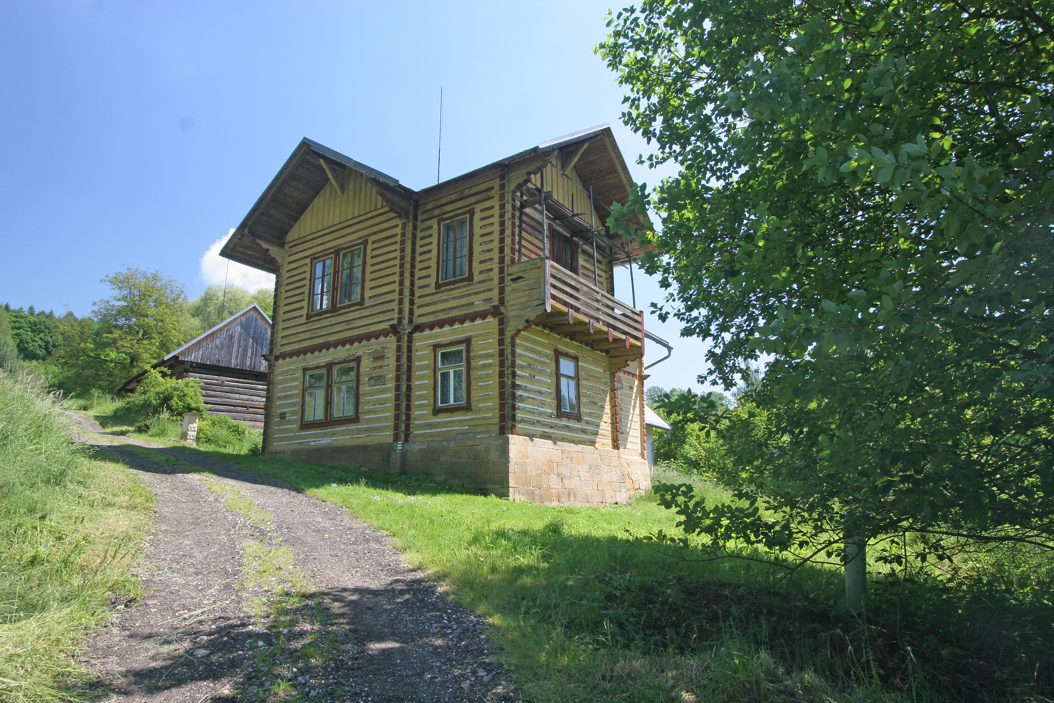 Libín čp 3